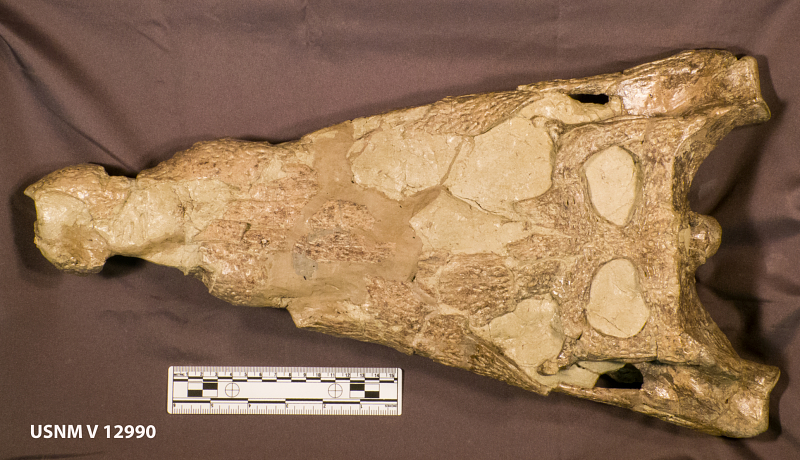 craneo de Borealosuchus